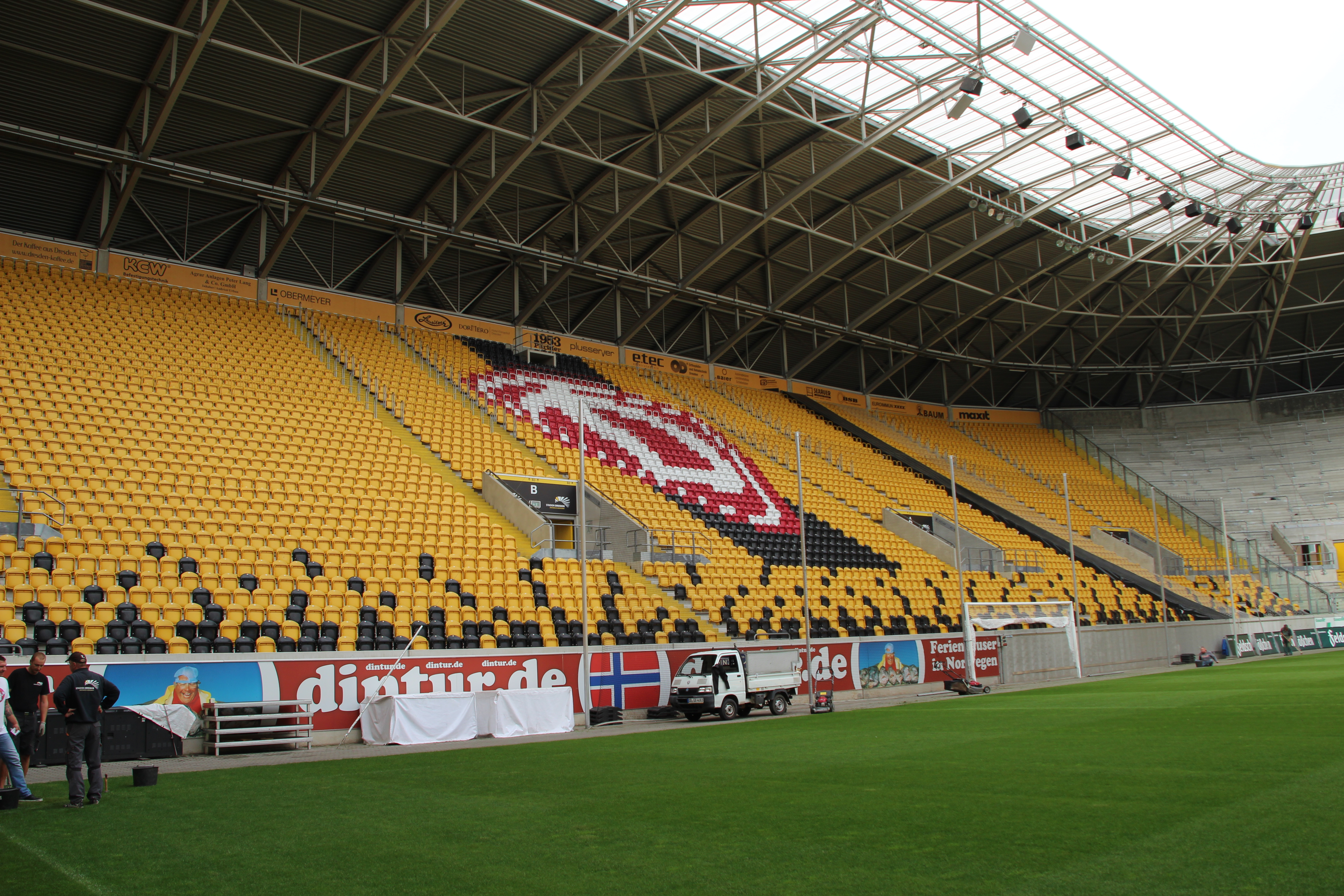 Bildinhalt: Stadion Dresden, Zuschauertribüne Aufnahmeort: Dresden, Deutschland